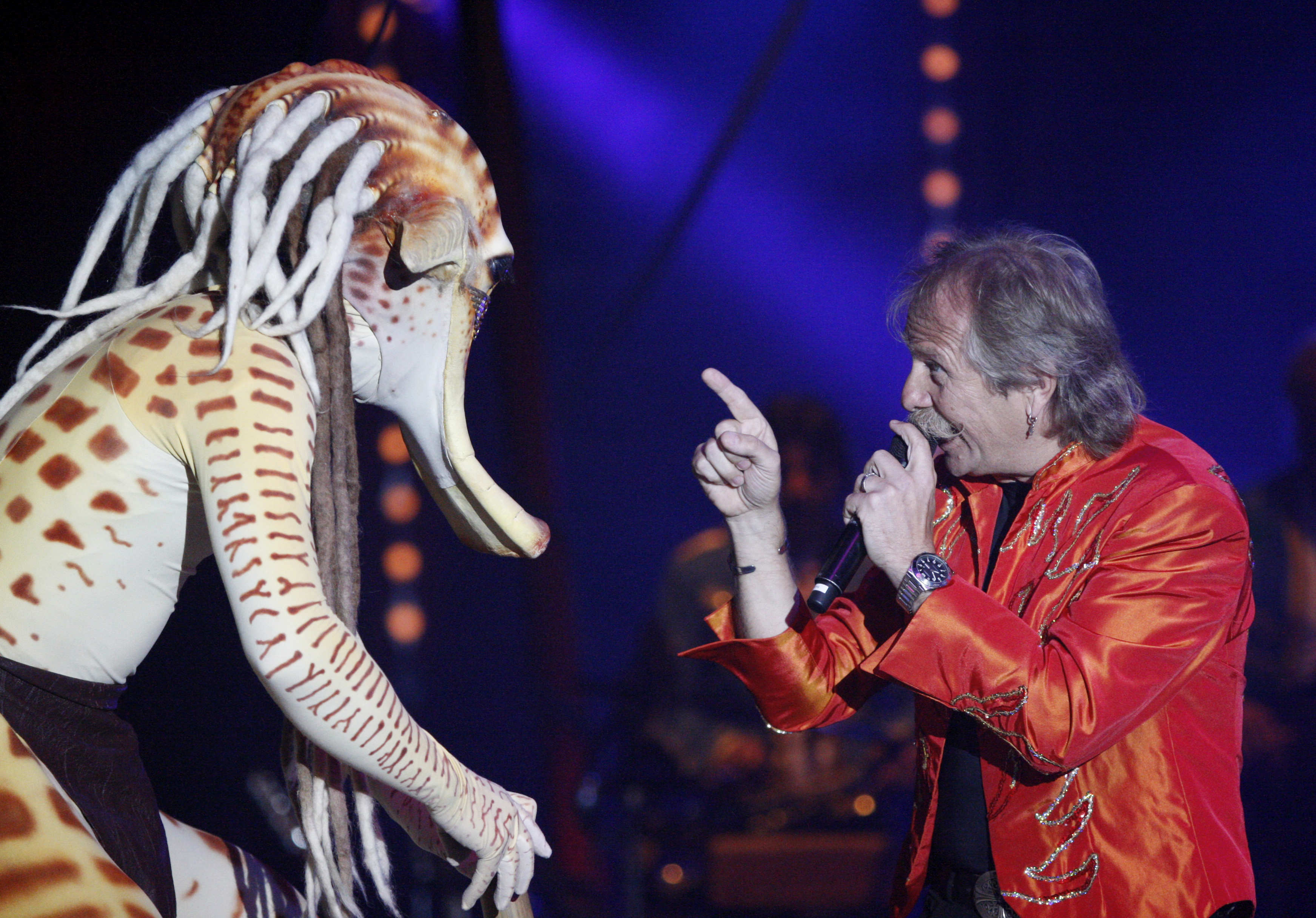 Der Frontmann der Höhner Henning Krautmacher bei der "Höhner Rockin' Roncalli Show" in Oberursel. (2011)